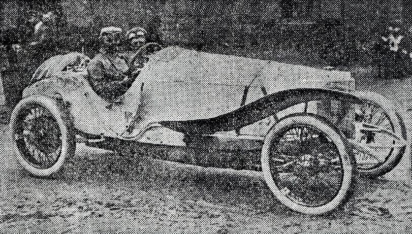 Christian Lautenschlager, vainqueur du Grand Prix de l'ACF 1914, sur Mercedes-Benz.